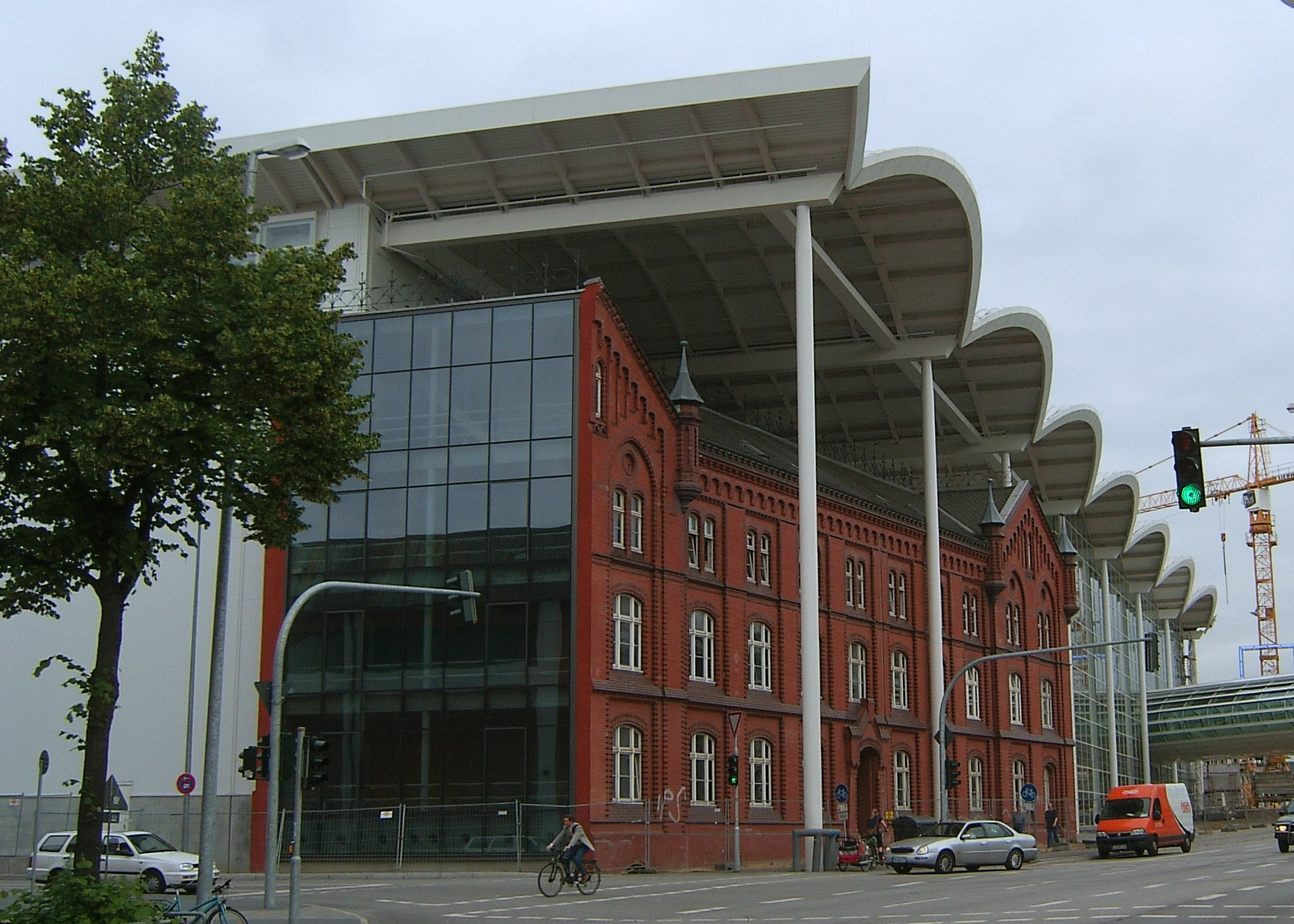 Das Verwaltungsgebäude des ehemaligen Kraftwerkes Karoline in der Karolinenstraße 36 auf St. Pauli wurde 1894/95 von Albert Winkler im Stil der Hannoverschen Schule erbaut. Es wird heute von den Neubauten der Hamburg-Messe schier erdrückt.